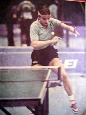 Marisel Ramírez